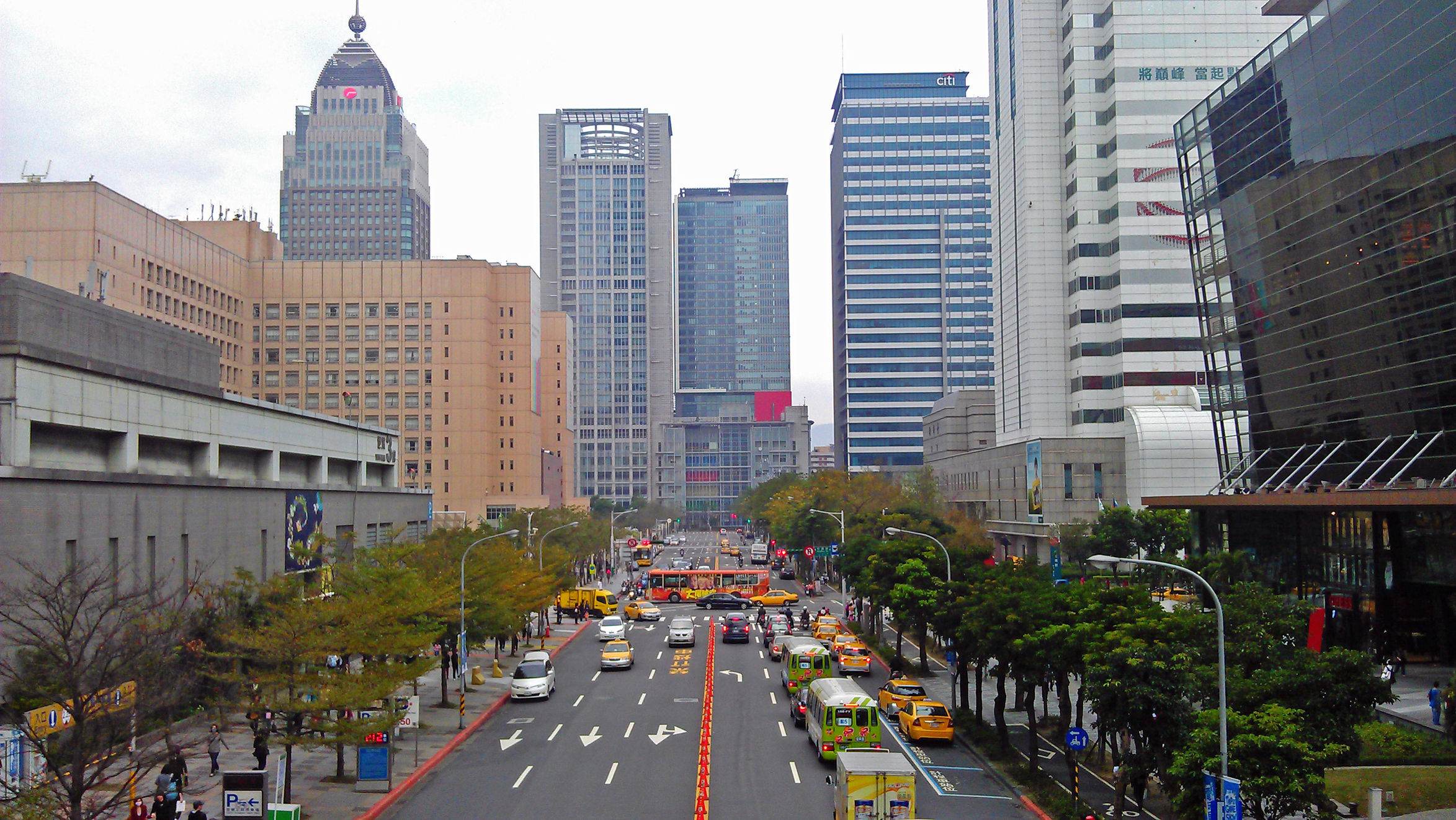 臺北市信義區松智路。